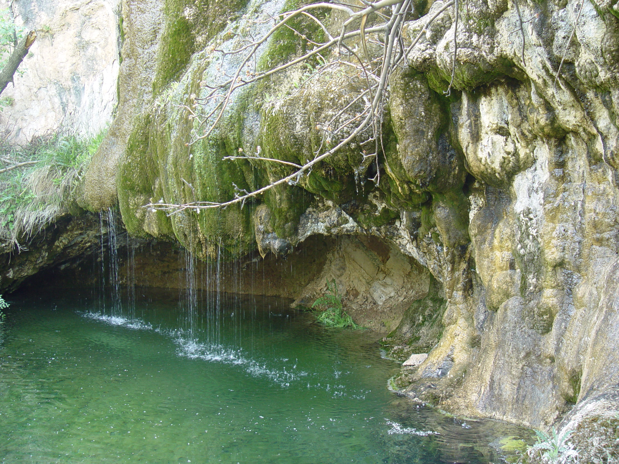 کالاش زنوز